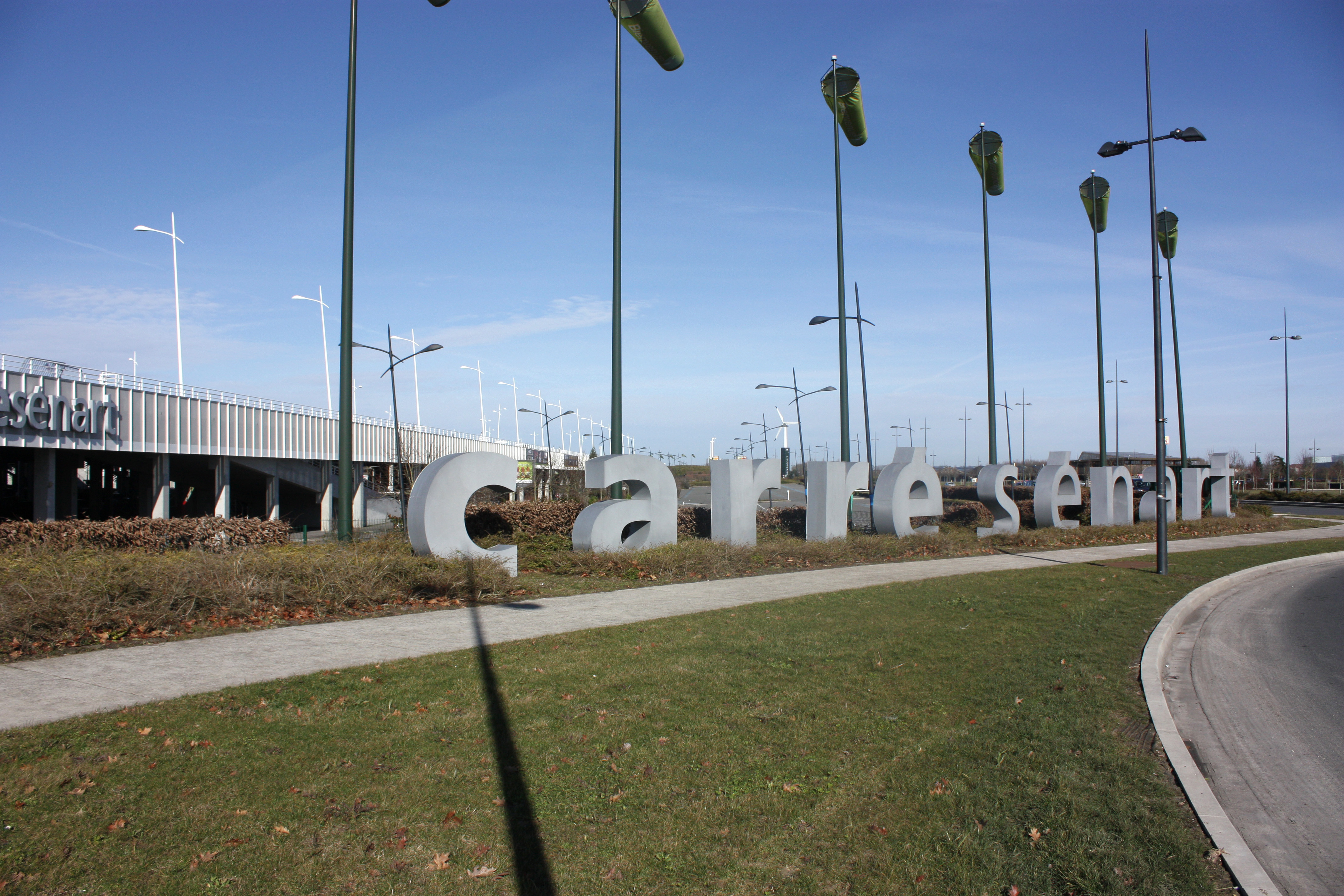 Parking du centre commercial Carré Sénart.